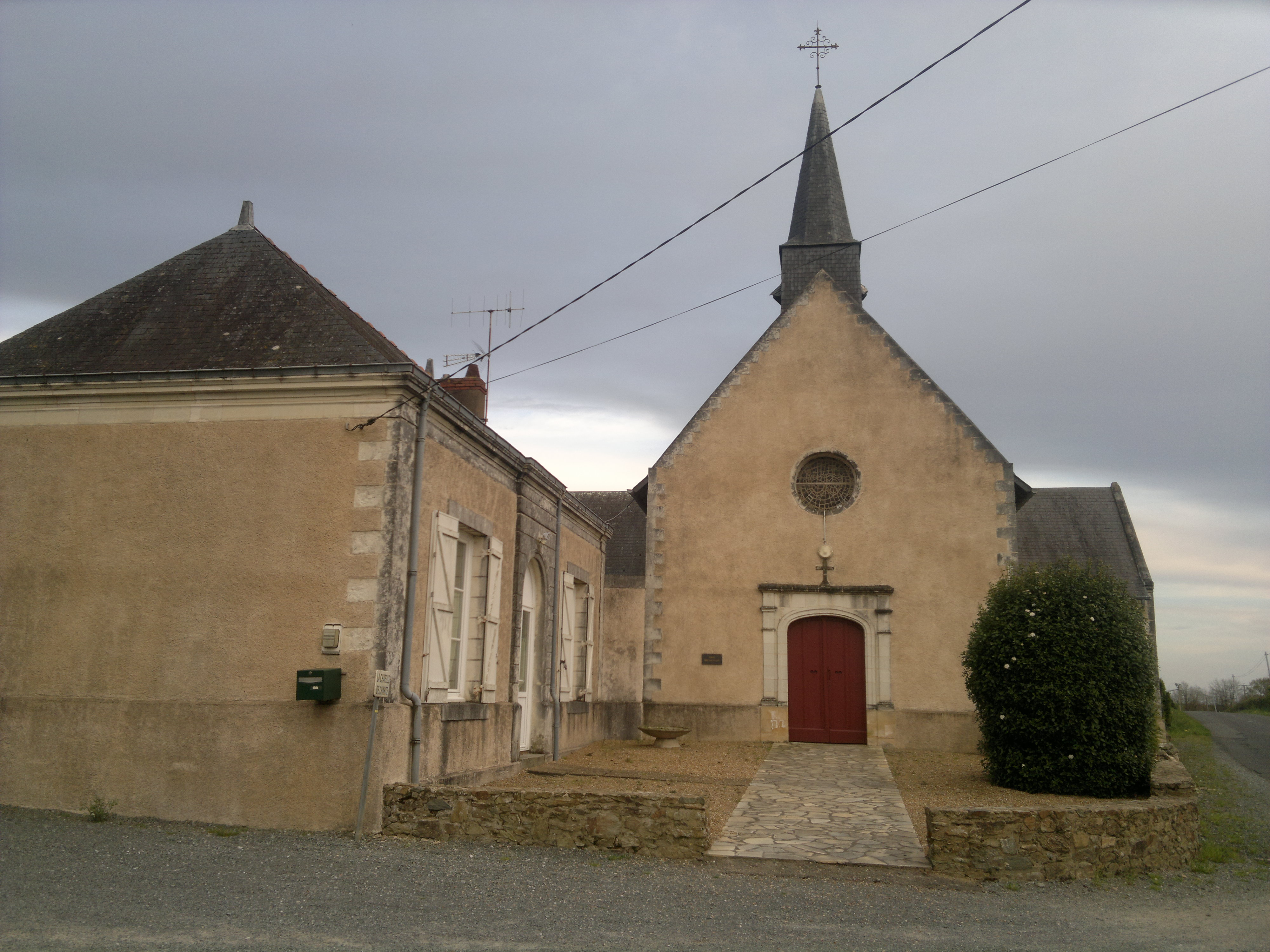 Chapelle Notre-Dame de Charité, Fr-49-Saint-Laurent-de-la-Plaine.